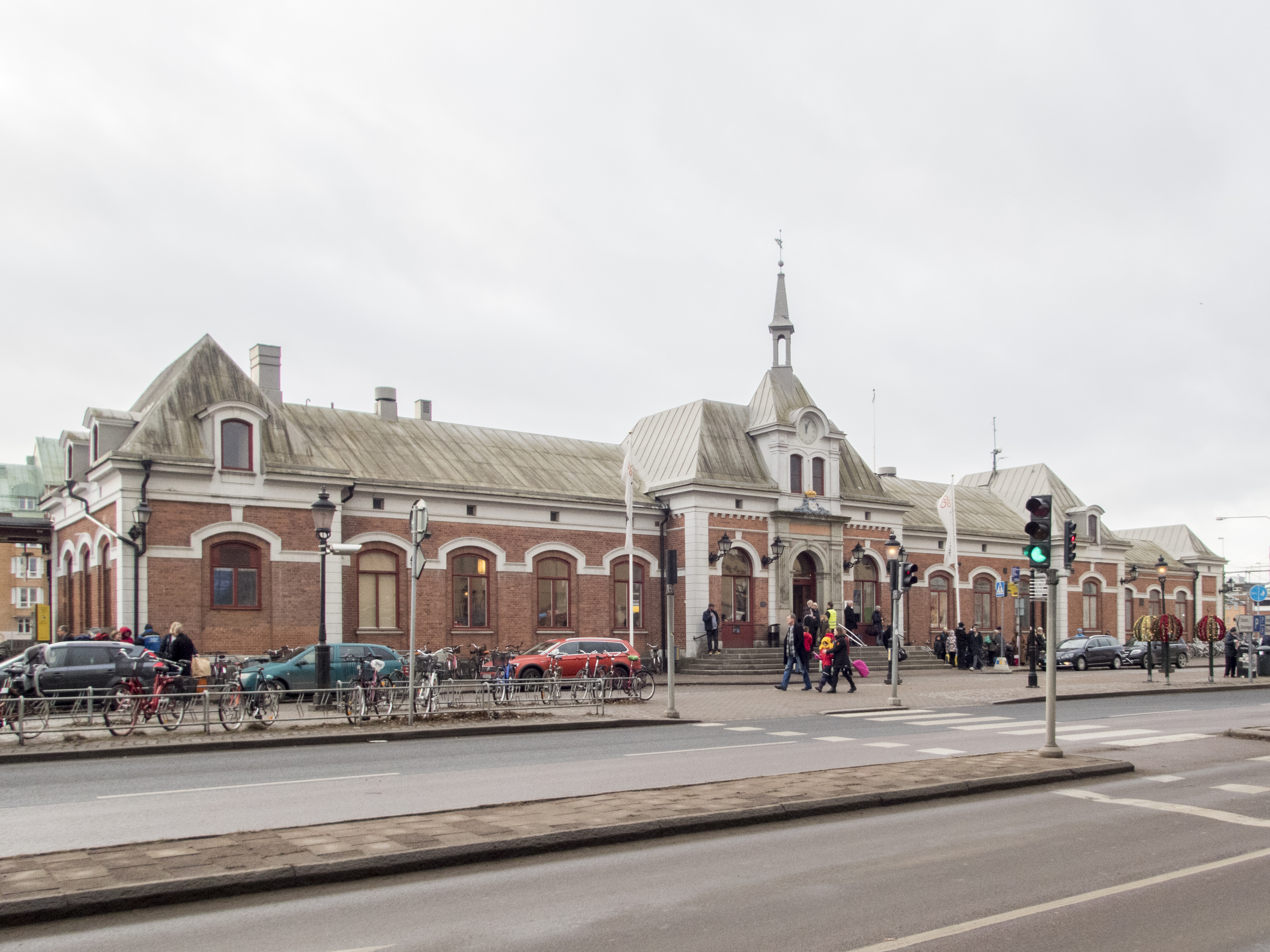 Karlstads centralstation.